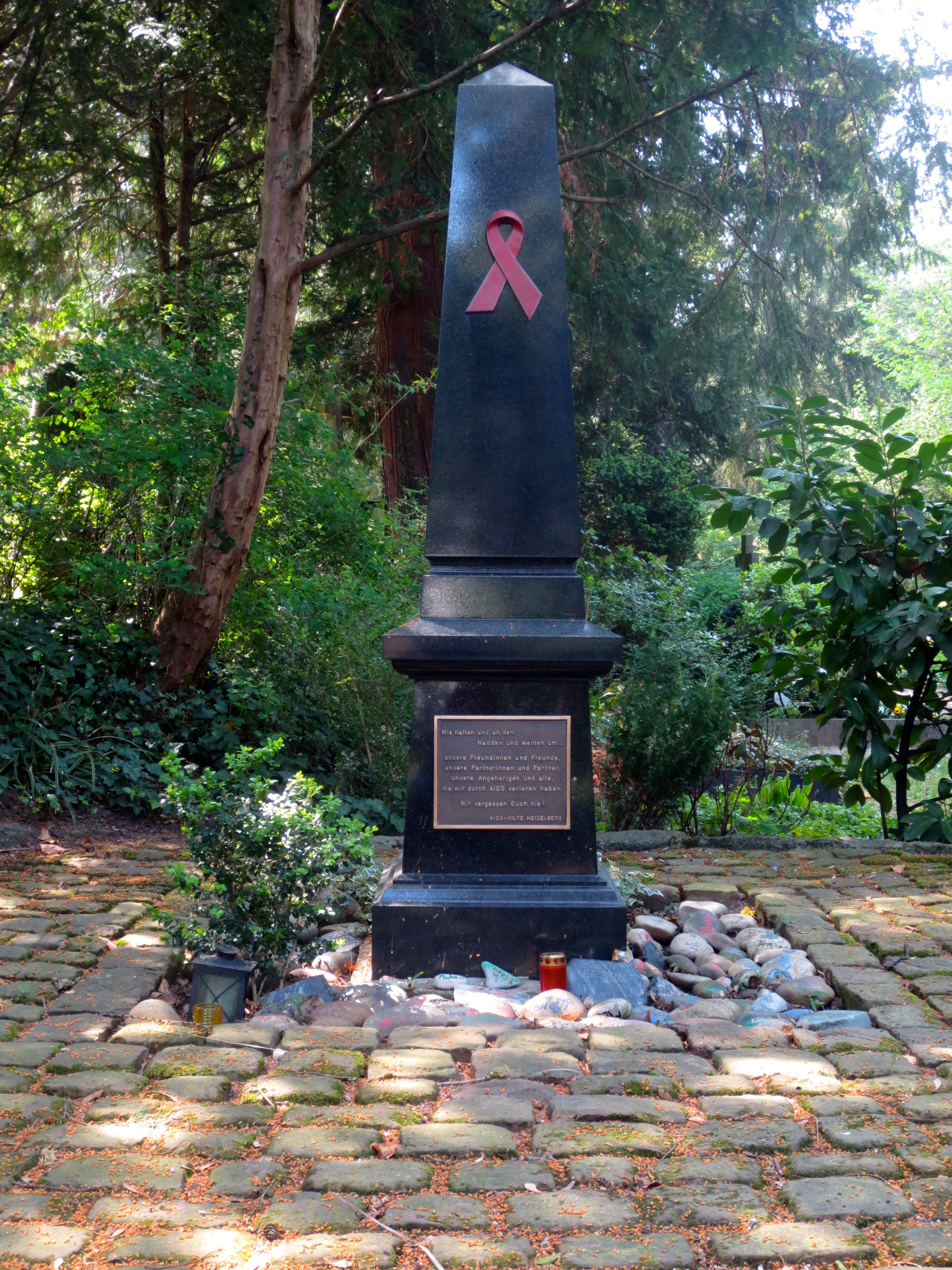 II. Ort des Gedenkens auf dem Bergfriedhof (Heidelberg) für alle die ihre Freunde und Angehörigen durch Aids verloren haben